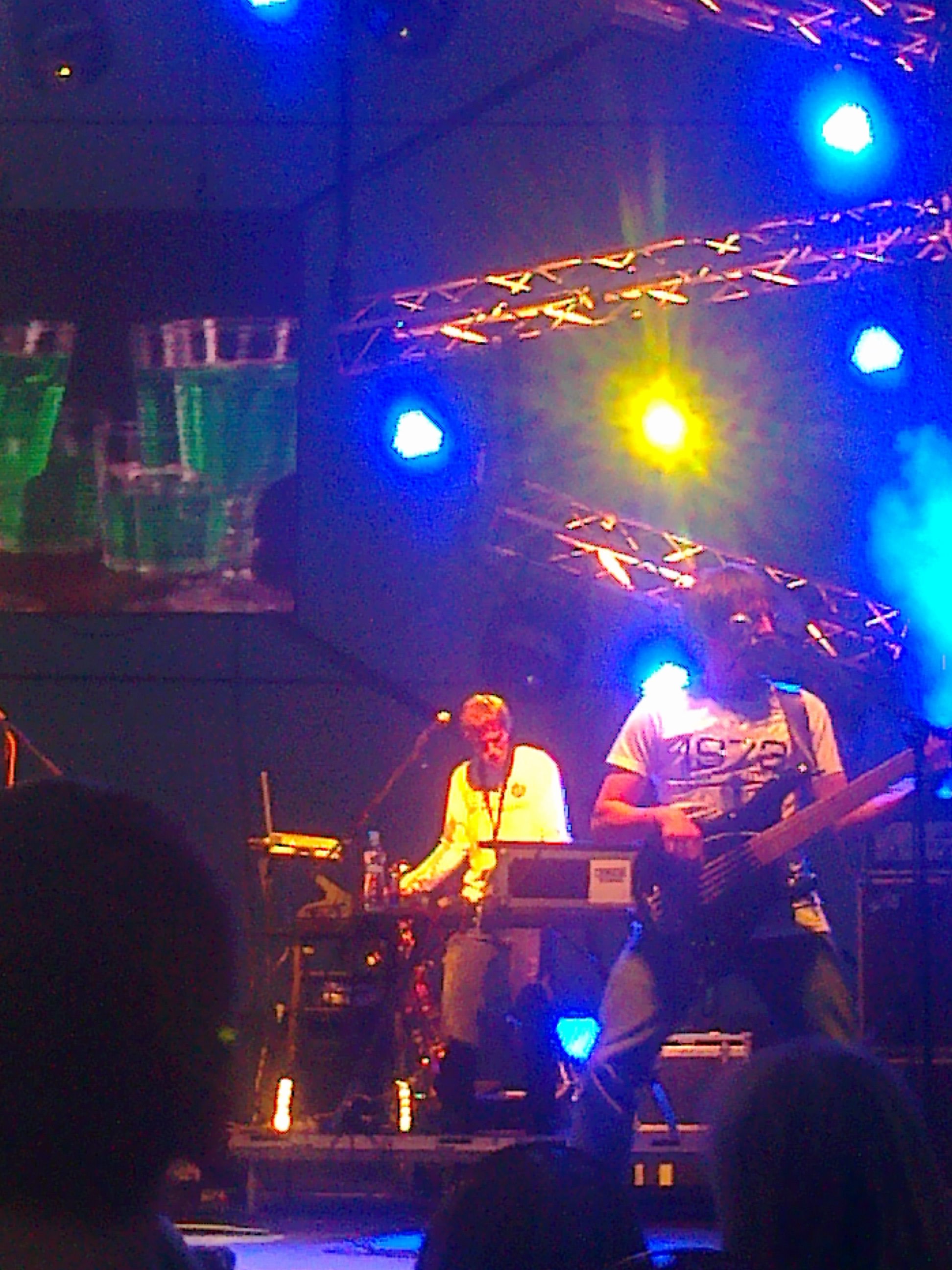 Ondřej Škoch (spolu s bratrem Štěpánem Škochem) na koncertě v Jihlavě v červnu 2011.